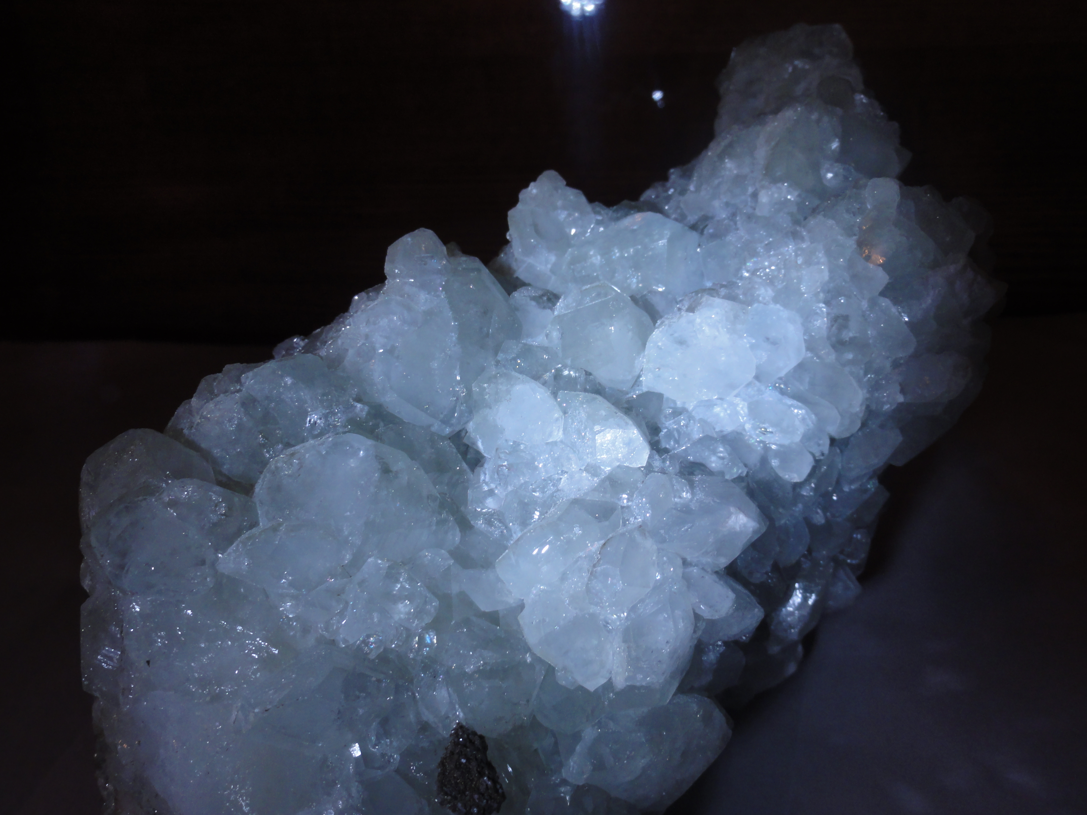 Гигантский сросток кристаллов датолита